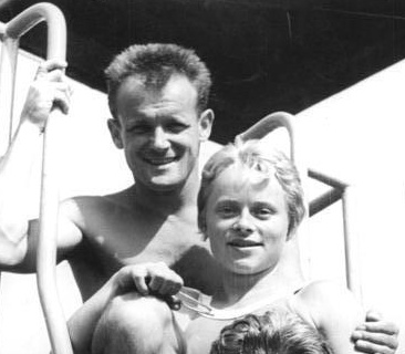 Rudi and Waltraud Oertel